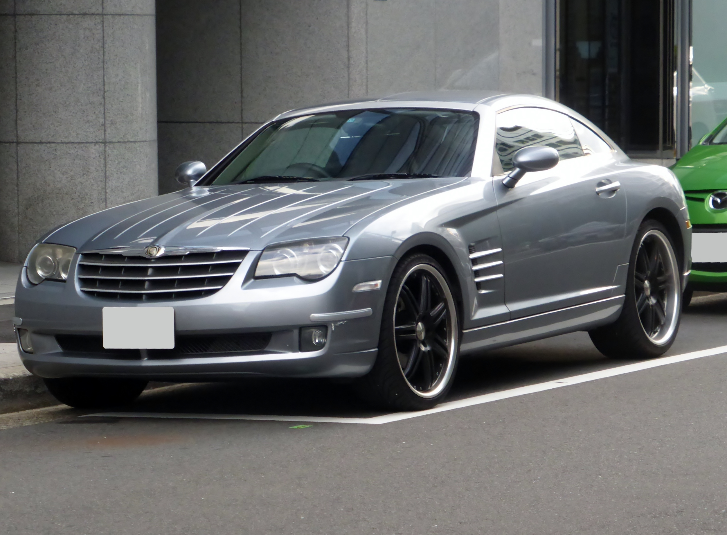 ZH32型クライスラー・クロスファイア3.2Lをフロントから撮影。